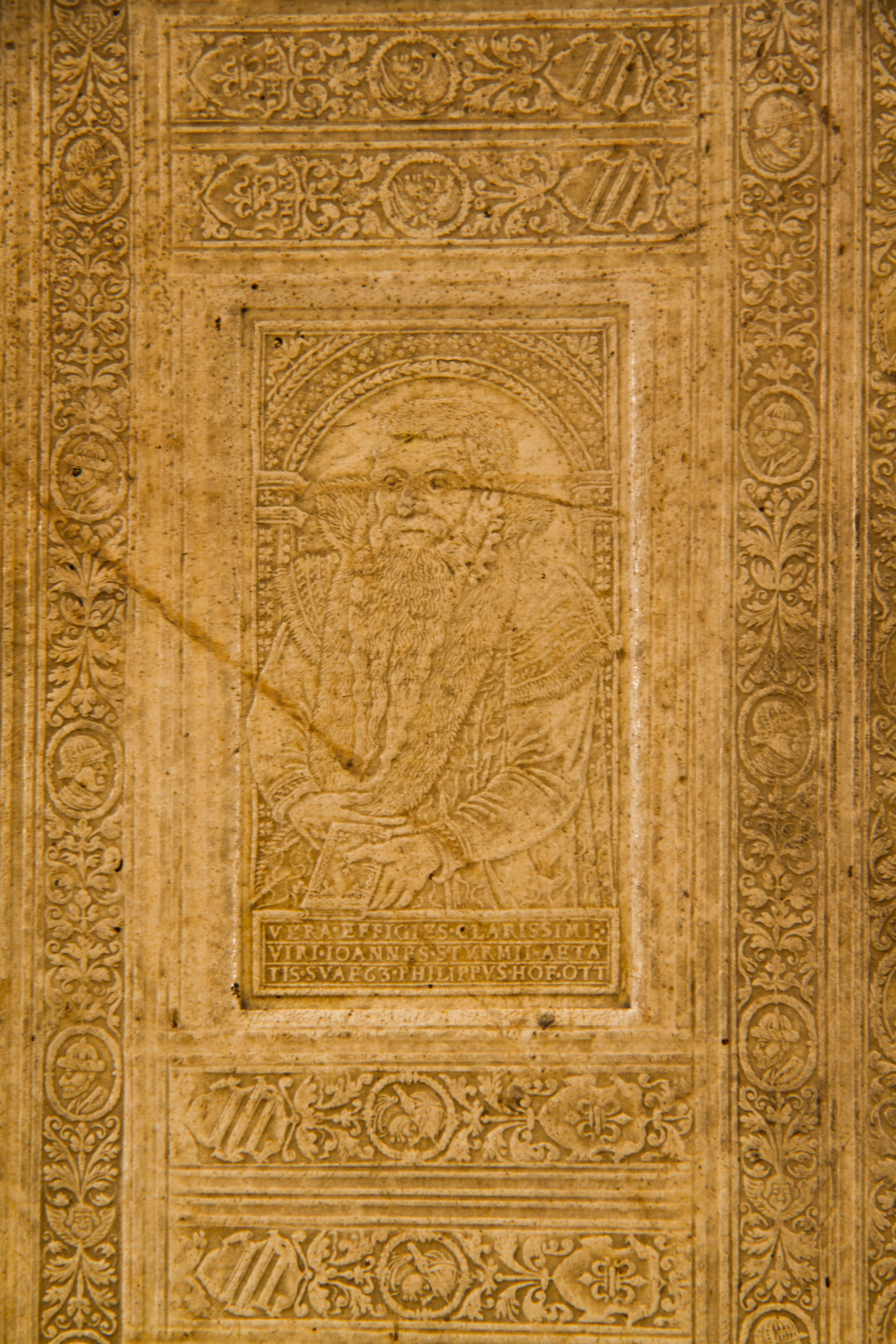 Portrait de l'humaniste Jean Sturm gaufré à la plaque sur une reliure du XVIe siècle, signée de Philippe Hoffott, relieur strasbourgeois. Bibliothèque du Grand Séminaire de Strasbourg. Conservateur : Louis Schlaefli.